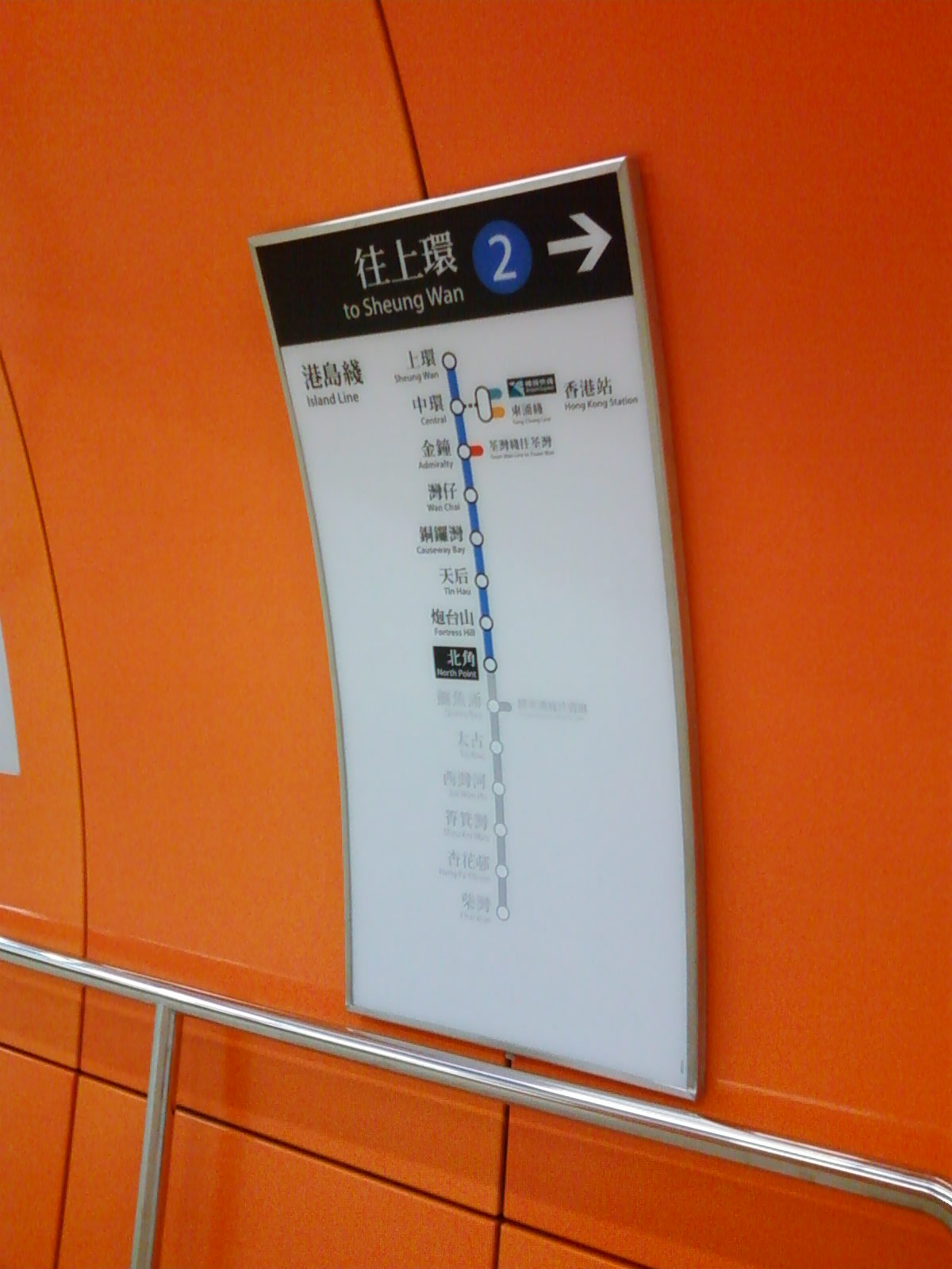 港鐵北角站港島綫路線圖